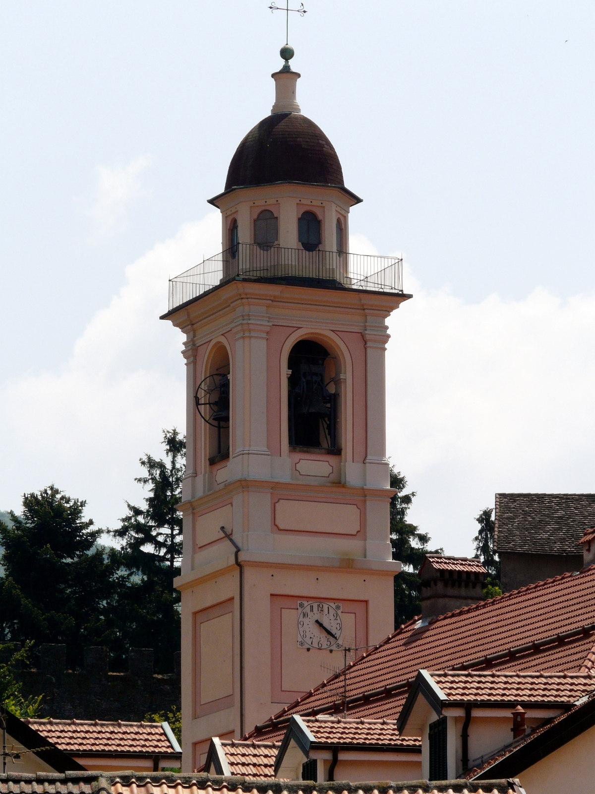 Campanile della chiesa della Natività di Maria Vergine, Campo Ligure, Liguria, Italia